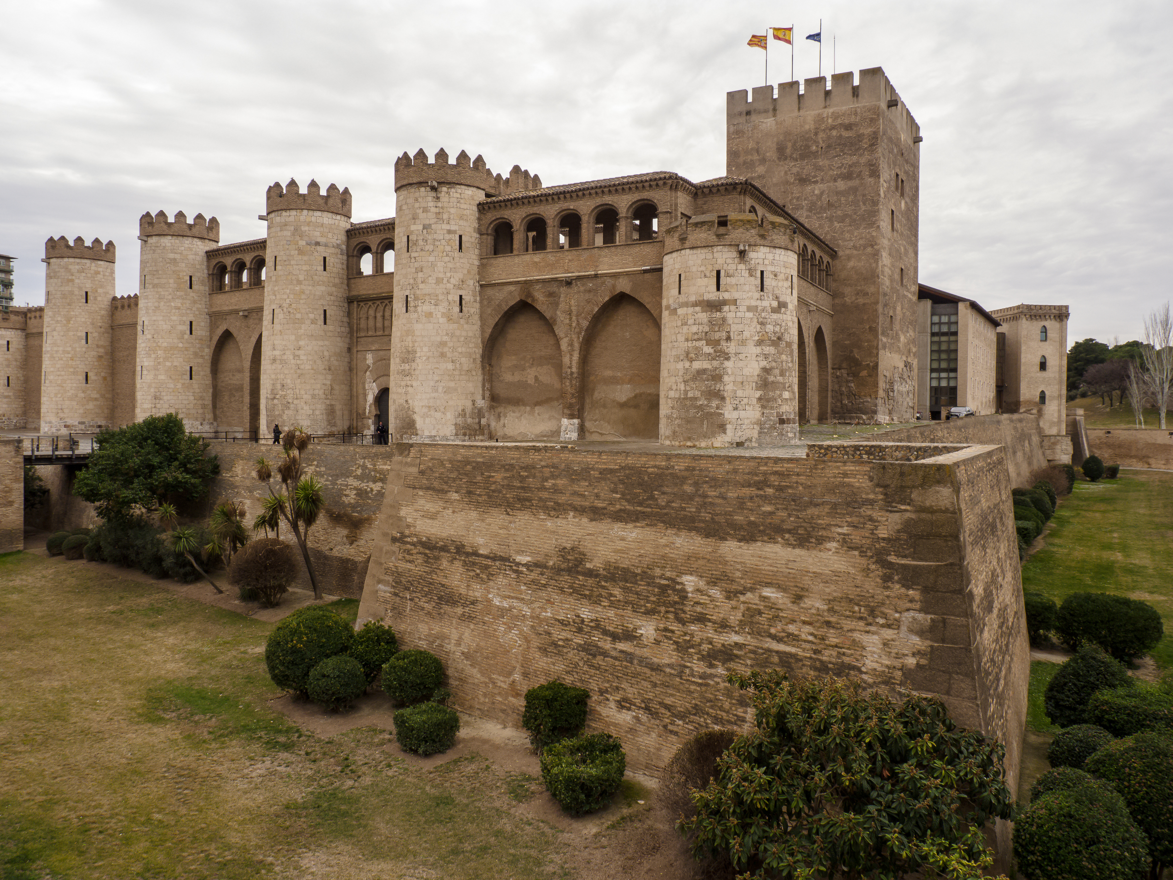 CS 07022010 #130950 #51351.jpg